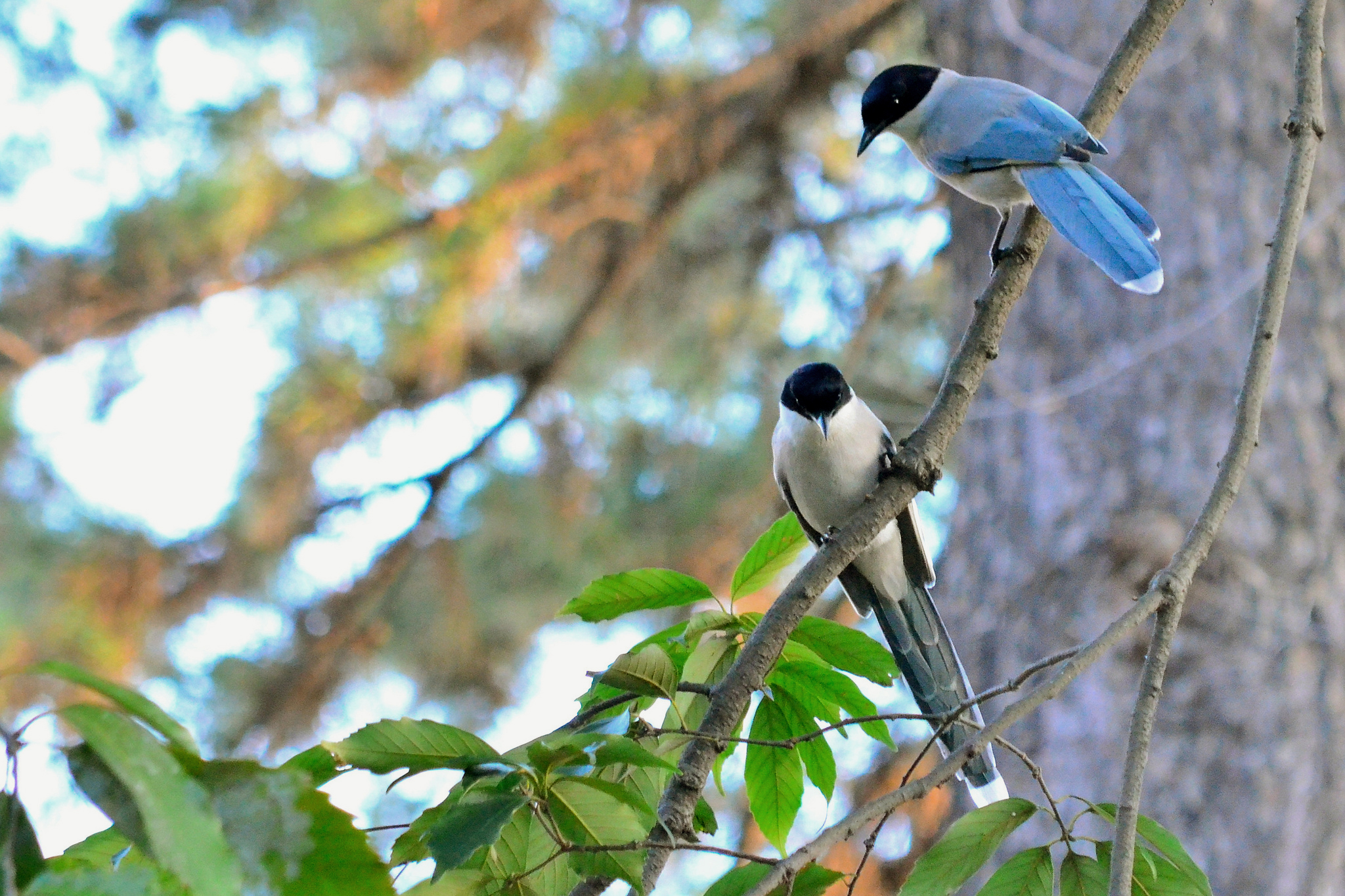 オナガ Azure-winged Magpie Cyanopica cyanus, Fujigaoka 2 Chome, Yokohama-shi, Kanagawa Prefecture, Japan.